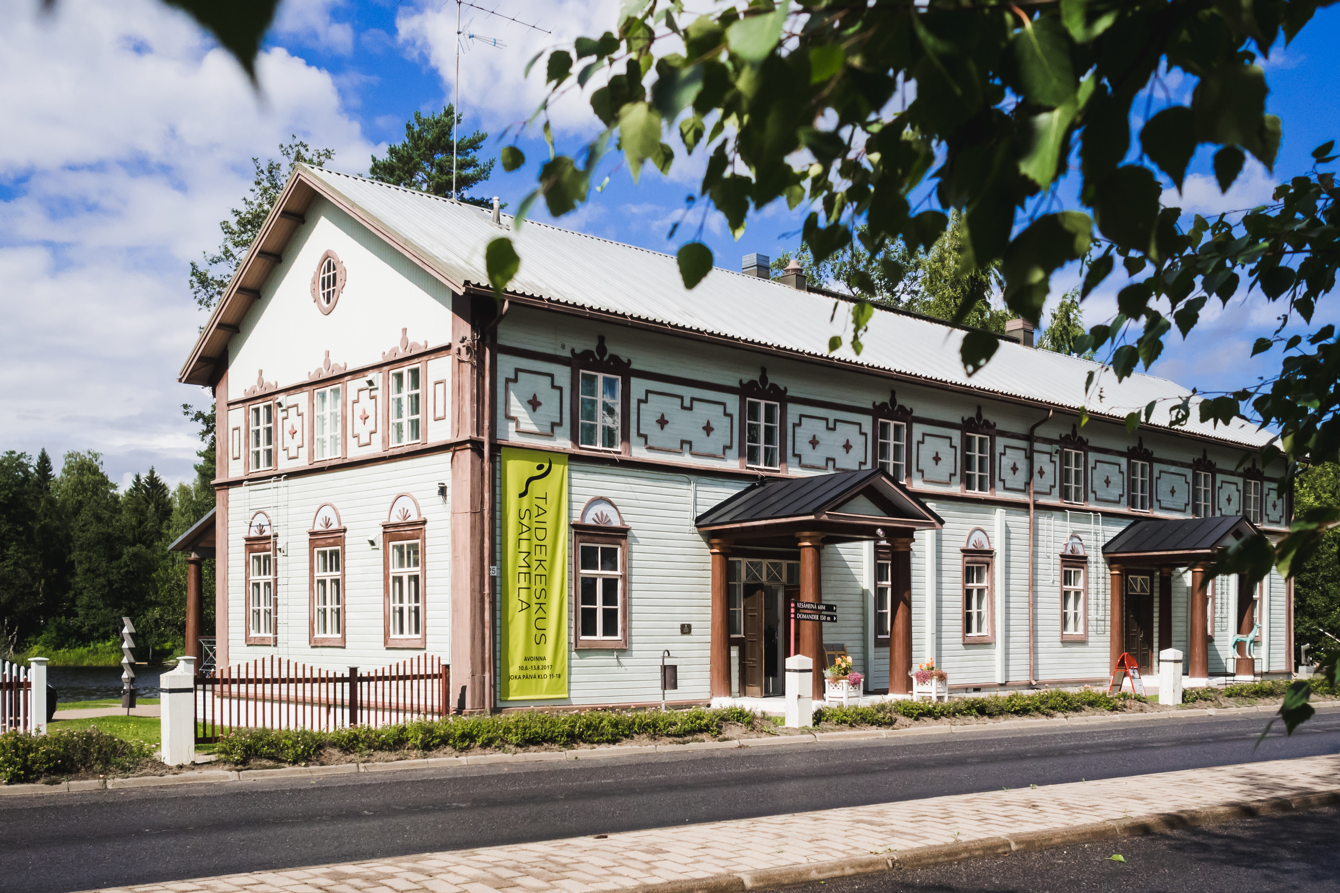 Taidekeskus Salmelan päärakennuksena toimii 1820-luvulla rakennettu vanha pitäjäntupa Salmela.